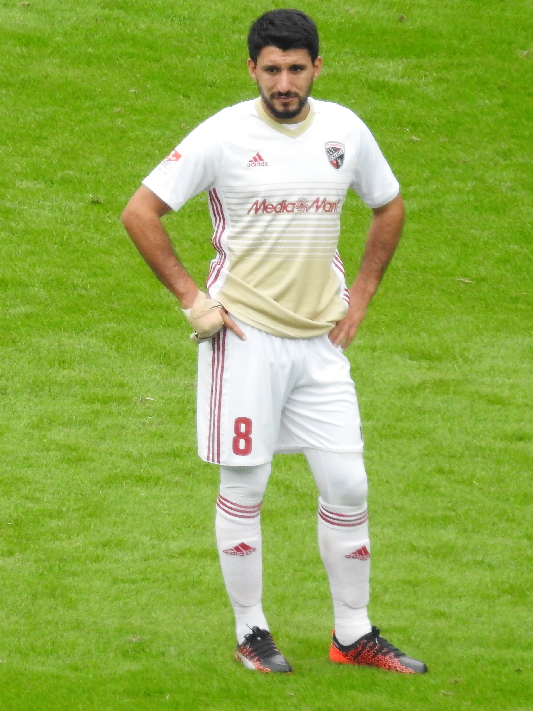 Almog Cohen Ingolstadt